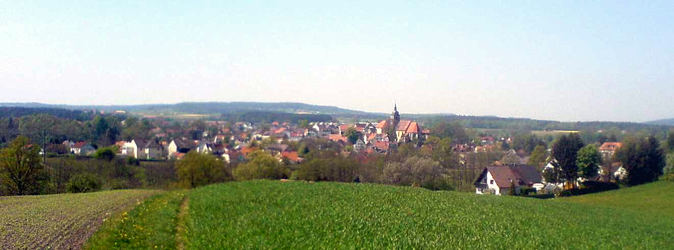 Ein Blick auf Creußen